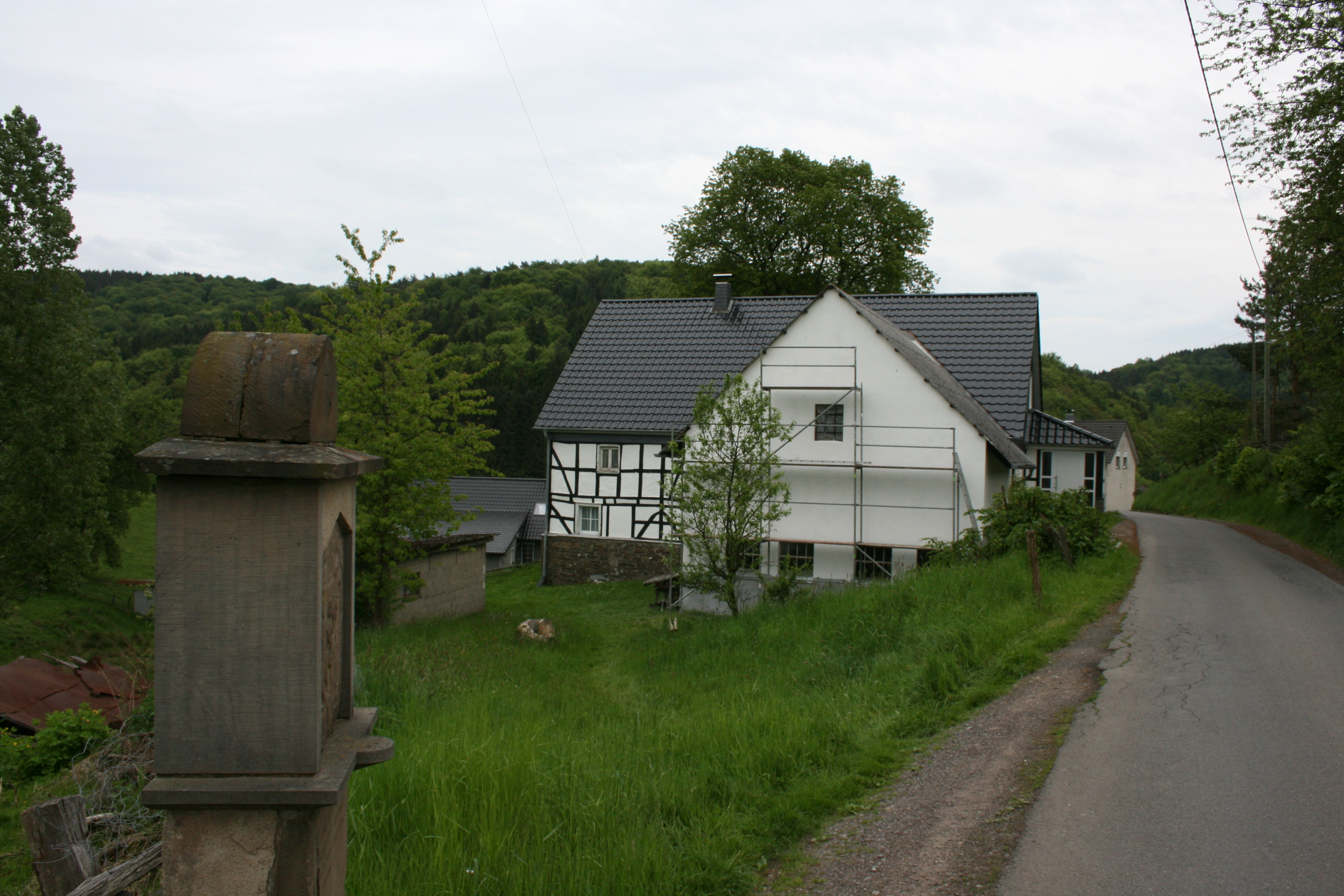 Zu sehen ist die Ortschaft Bühlstahl in Wipperfürth. Im Vordergrund befindet sich ein Wegekreuz.